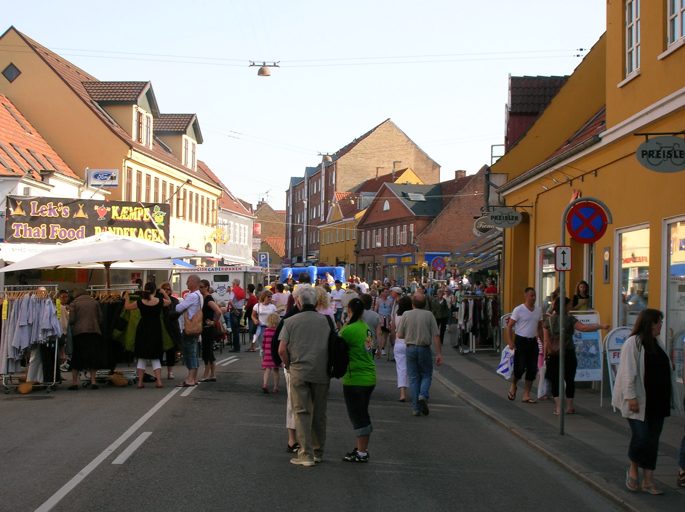 Smedelundsgade.